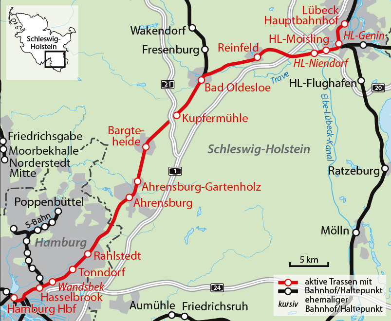 Karte der Bahnstrecke Lübeck–Hamburg